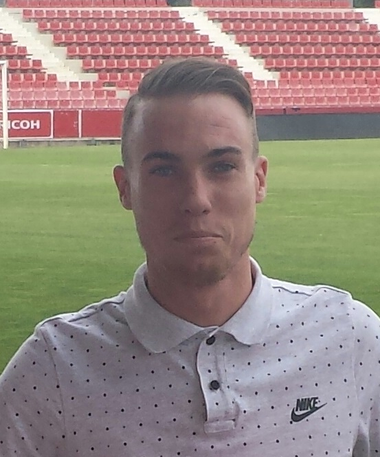 Carlos Clerc